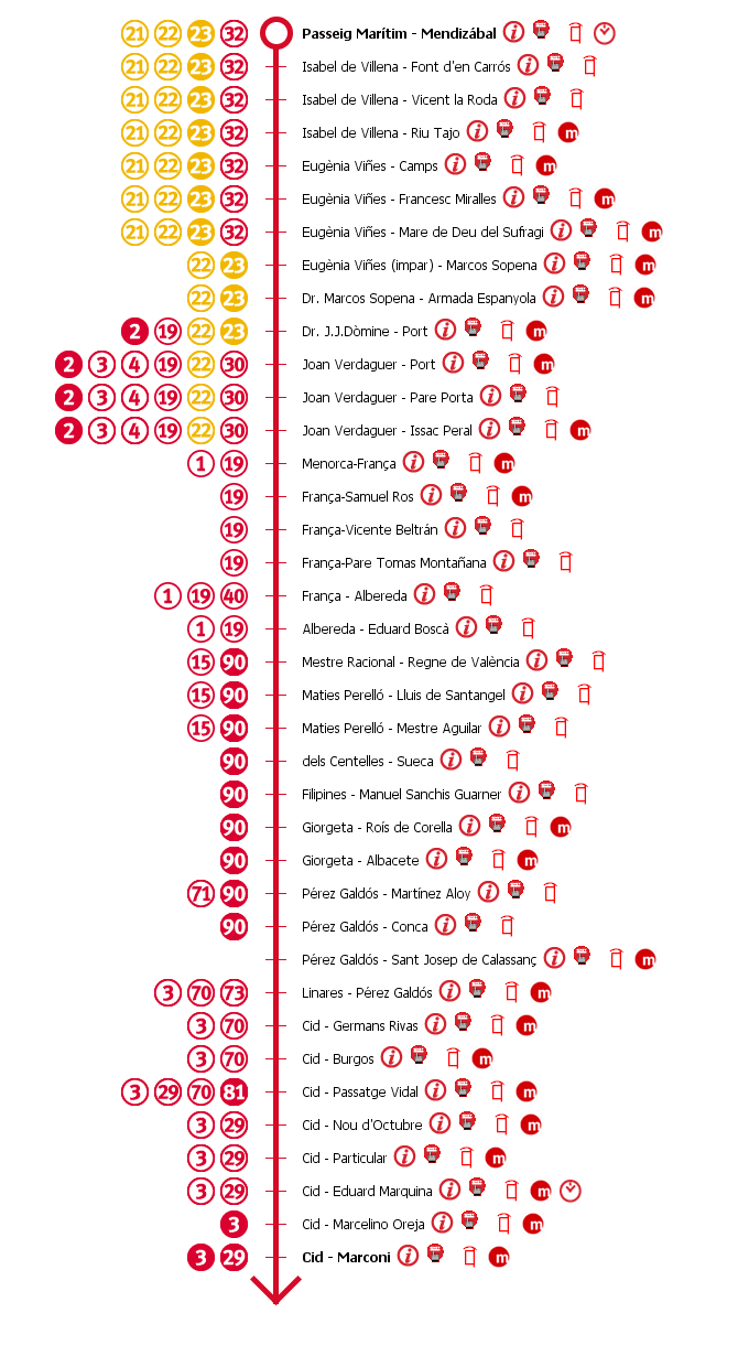 Esquema de paradas de la línea 20 de EMT Valencia